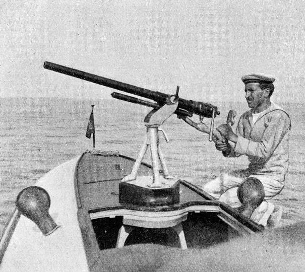 Pezzo su motoscafo italiano MAS. Prima guerra mondiale. Descrizione originaria: Manovra al pezzo